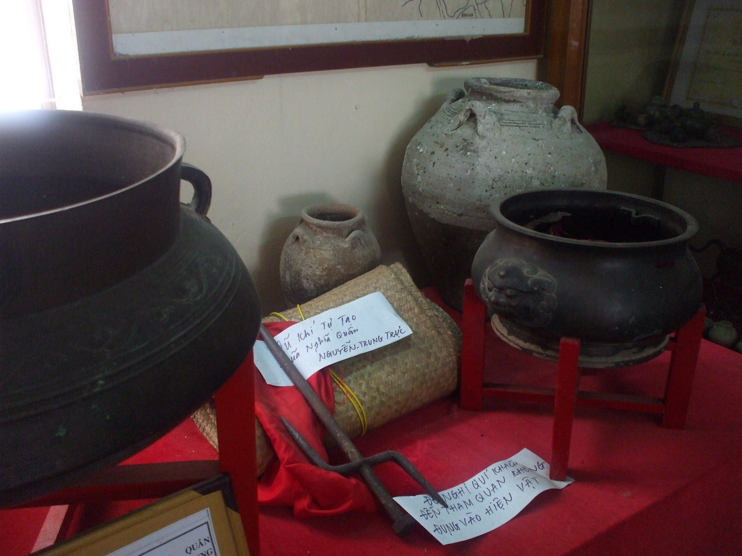 Nồi đồng dùng để nấu ăn và vũ khí tự tạo của nghĩa quân Nguyễn Trung Trực đã sử dụng tại Ba Trại (Hòn Chông, Kiên Lương, Kiên Giang, Việt Nam). Hiện đang được trưng bày trong đình Nguyễn Trung Trực tại thành phố Rạch Giá (Kiên Giang).